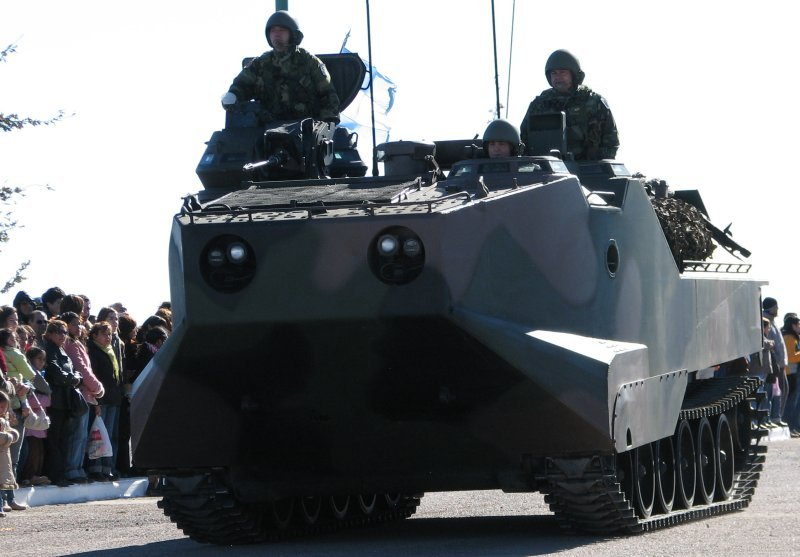 LVTP7 de la Infanteria de Marina Argentina (IMARA), conocido localmente como VAO (Vehiculo anfibio a Orugas)